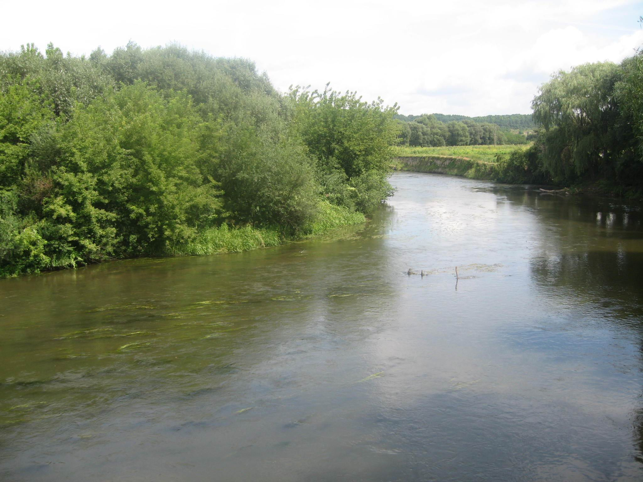 Goryn river near Izyaslav